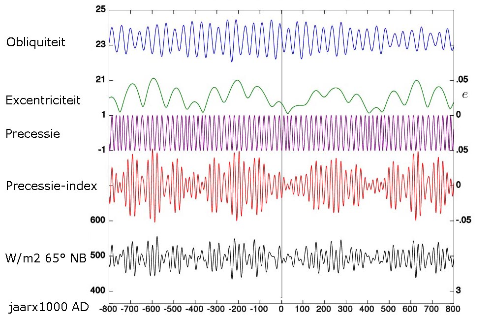 Milanković theorie beschrijft de effecten van de beweging van de planeet aarde op het wereldklimaat. Milutin Milankovićbeschrijft in een publicatie in 1941 dat de variaties in de baan van de aarde rond de zon (excentriciteit), de variaties in de aardashoek (obliquiteit) en de tolbeweging van de aardas (precessie) van invloed zijn op de temperatuur op aarde. Als gevolg van deze variaties varieert de temperatuur op aarde en zijn de ijstijden gedurende het Kwartair (2,5 miljoen jaar – heden) te verklaren. De curve Solar Forcing toont het berekende effect van de excentriciteit, precessie en obliquiteit op de hoeveelheid ontvangen zonne-energie die op een zomerse dag aan de buitenkant van de dampkring op een vierkante meter wordt ontvangen op 65 graden NB. Omdat de periodiciteit van de 3 factoren bekend is kan ook berekend worden wat het effect in de toekomst zal zijn. De grafieken lopen dan ook van -800.000 jaar A.D. tot +800.000 jaar A.D.